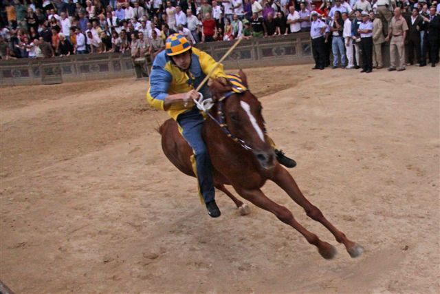 Una scena di Palio: il fantino Gingillo in corsa.